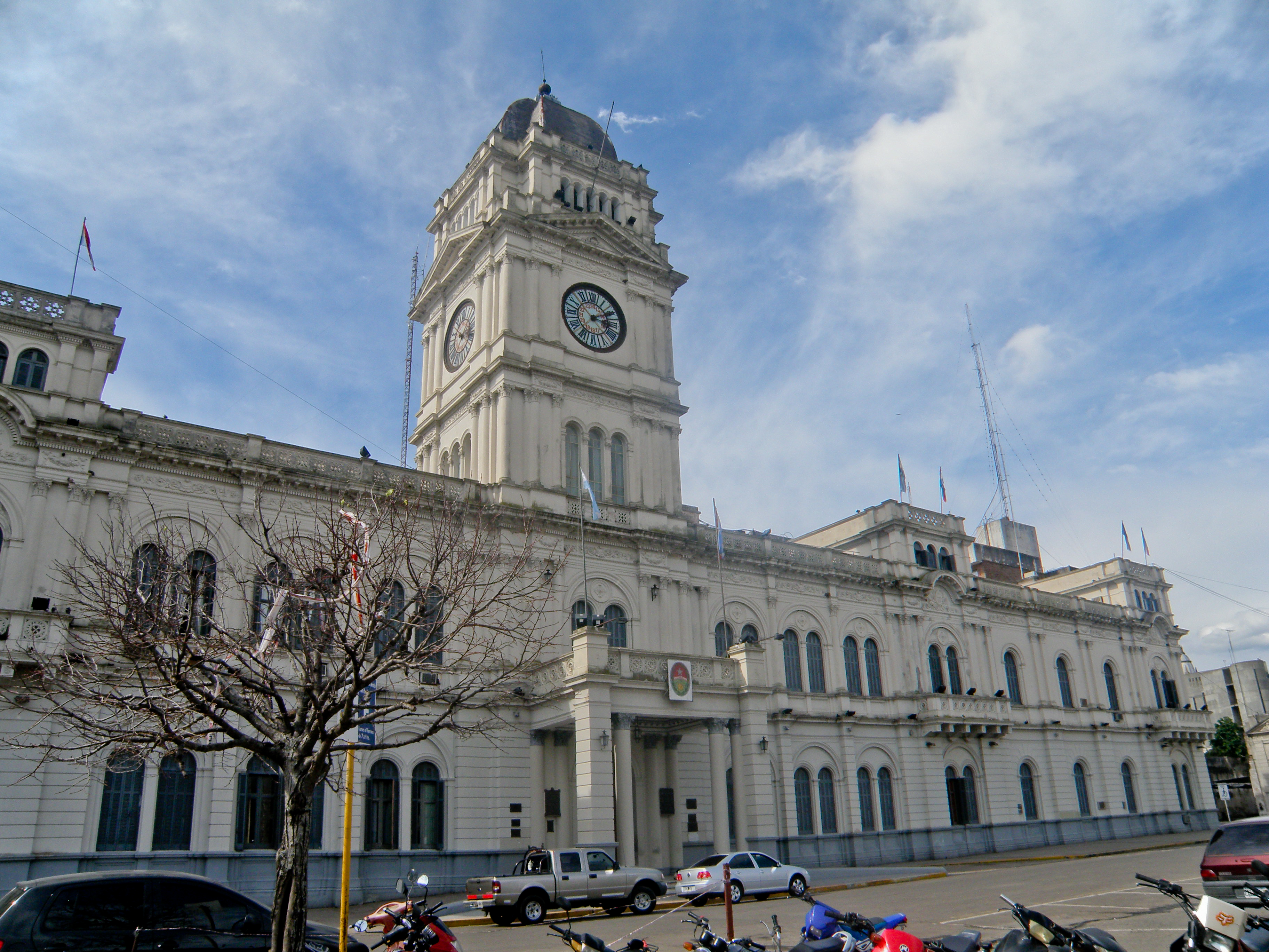 La Casa de Gobierno de la provincia de Entre Ríos fue declarada monumento nacional por resolución del año 1986. En 1884, el gobernador de la provincia, General Eduardo Racedo, encomendó al jefe del departamento topográfico, Don Bernardo Rigolli, el proyecto de una casa de gobierno encargada de centralizar los poderes ejecutivo y legislativo. La obra, concebida a modo de palacio europeo, se encuentra coronada por una torre reloj. Este ultimo de procedencia correntina. La casa contratista encargada de crear el reloj y las campanas fue Ernesto Hoffmann y Augusto Sedner. Augusto Sedner, relojero constructor, combinó el mecanismo en todos sus detalles; ordeno su especial fabricación, y coloco toda la obra en la torre construida íntegramente bajo sus ordenes.